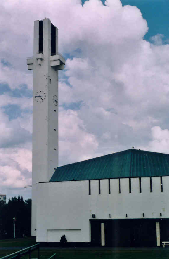 Alvar Aalto centrum i Östermyra (Seinäjoki), sommaren 2003. En bild tagen av Harri Blomberg.